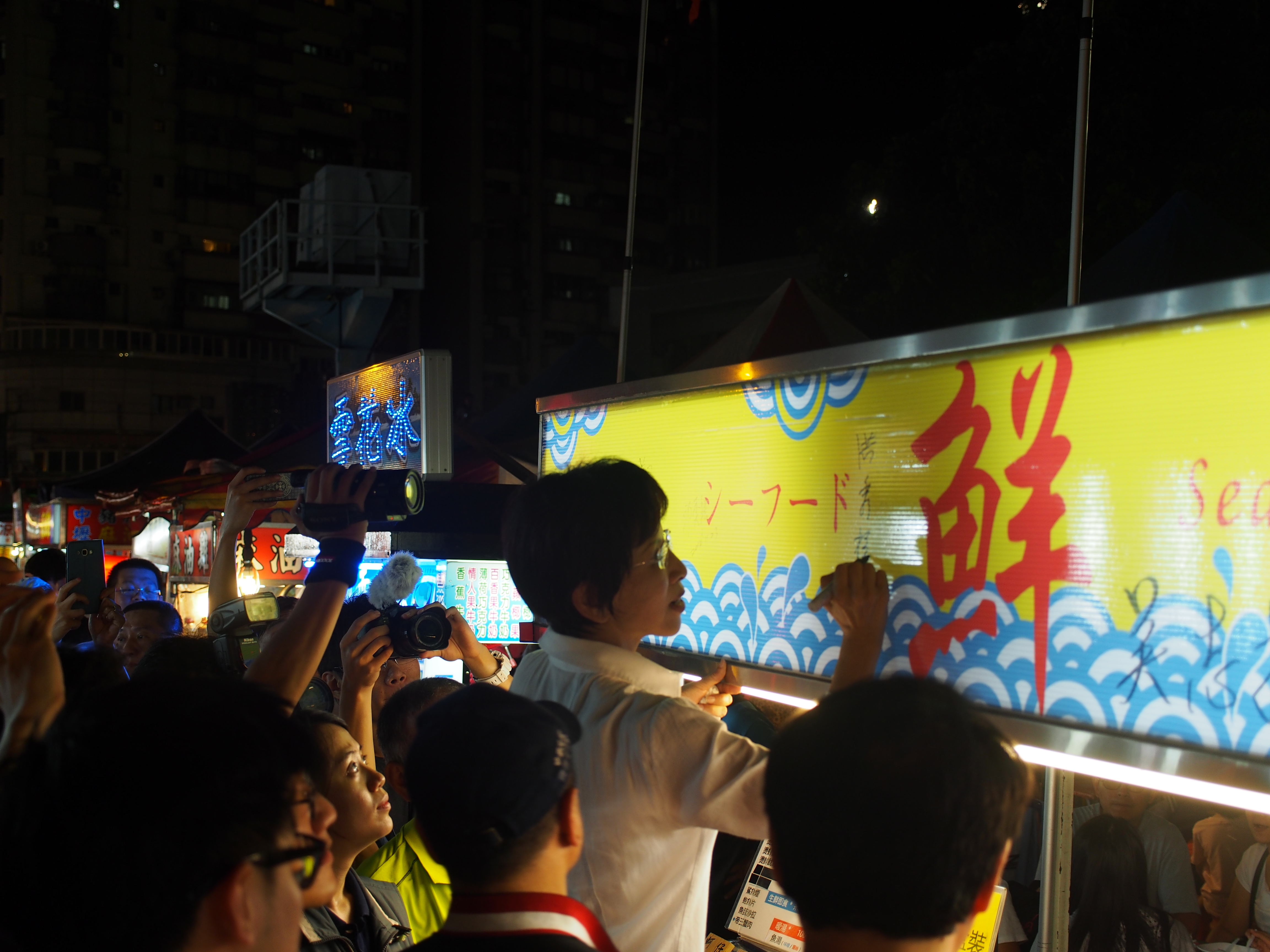 柱柱姐@中壢夜市with中立選民